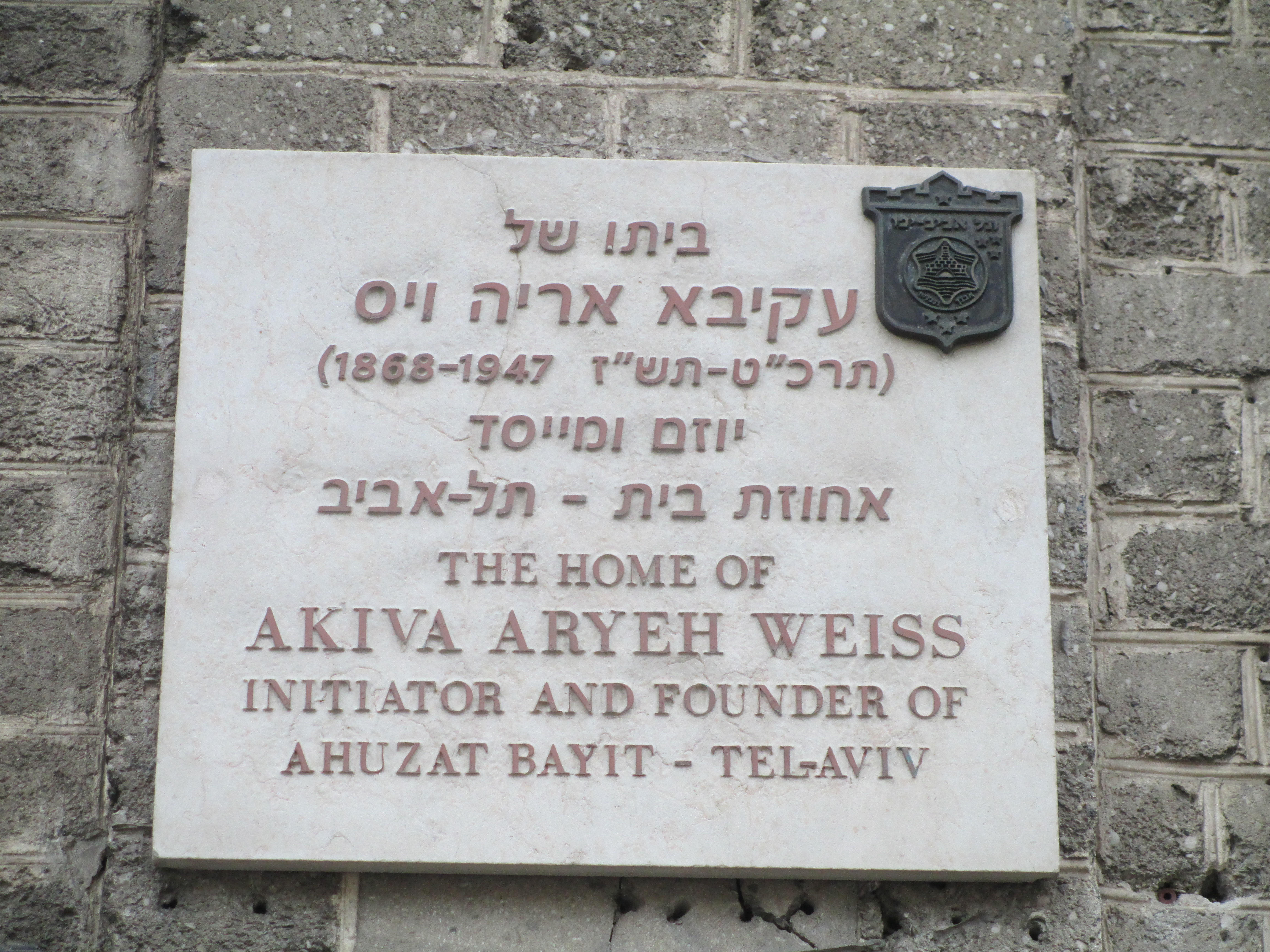 לוחית זיכרון על ביתו של עקיבא אריה וייס ברחוב הרצל 2 בתל אביב